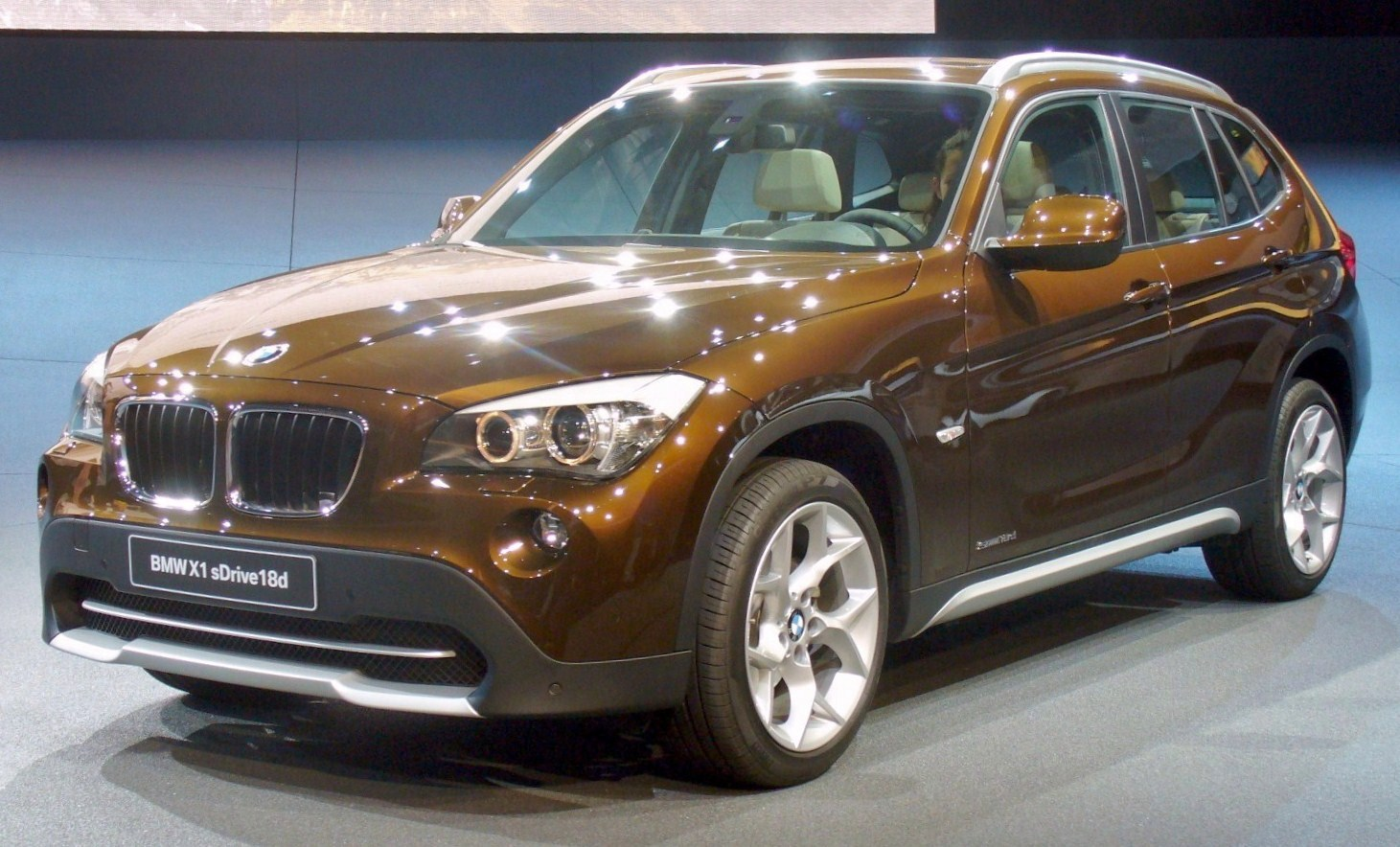 BMW X1